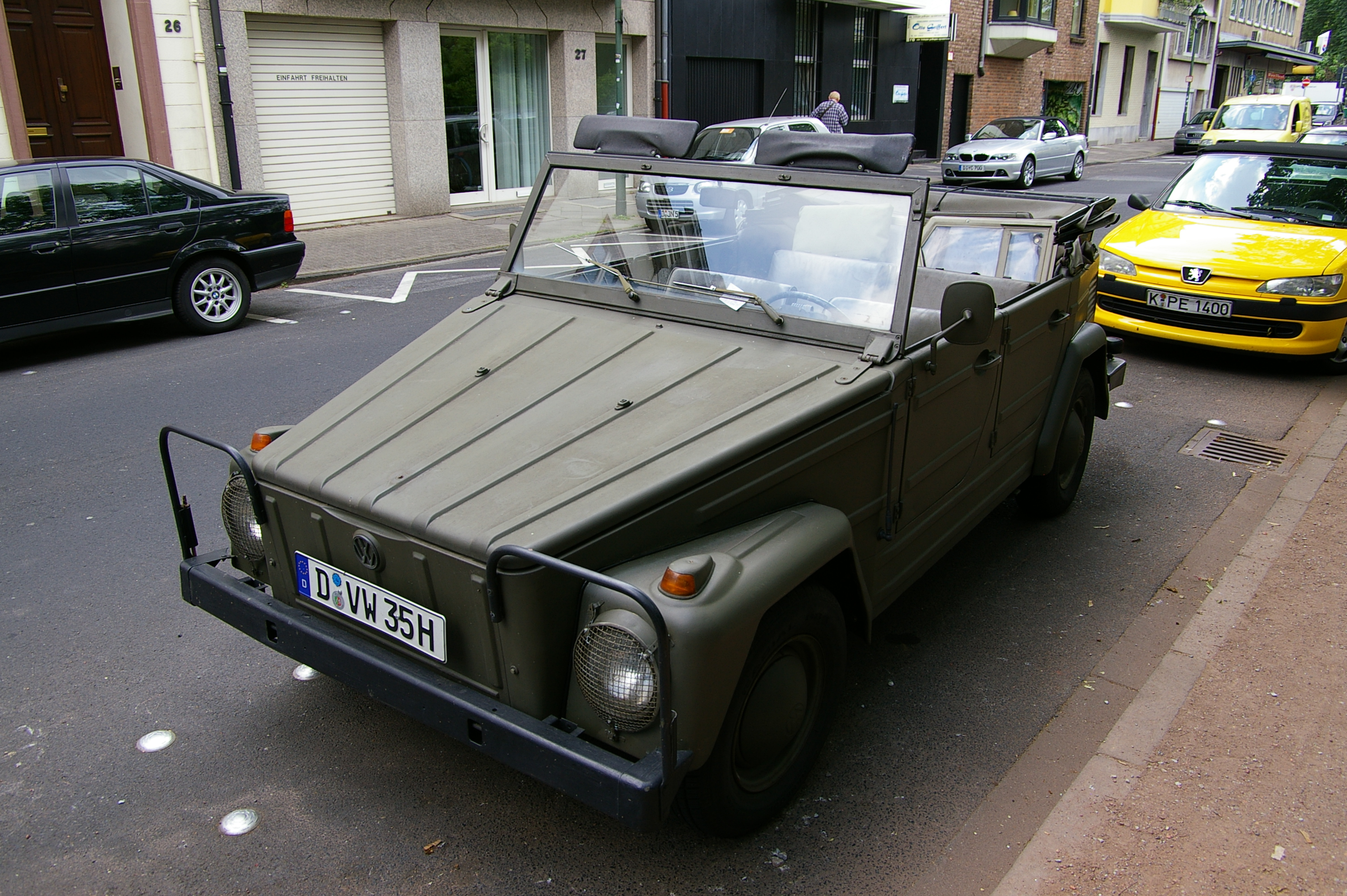 VW Kurierwagen Genehmigung: GFDL (Version 1.2, November 2002), kein wie auch immer geartetes "Gentlemen-Agreement". Bildnutzung ohne Einhaltung der Bestimmungen der GFDL ist kostenpflichtig und wird vom Rechteinhaber in Rechnung gestellt. Zweitlizensierung ggf. auch unentgeltlich auf Anfrage. Es gelten die AGB.